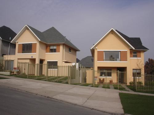 Típico Barrio que se construye actualmente en el sector sur oriente de la ciudad de Puente Alto. Chile.